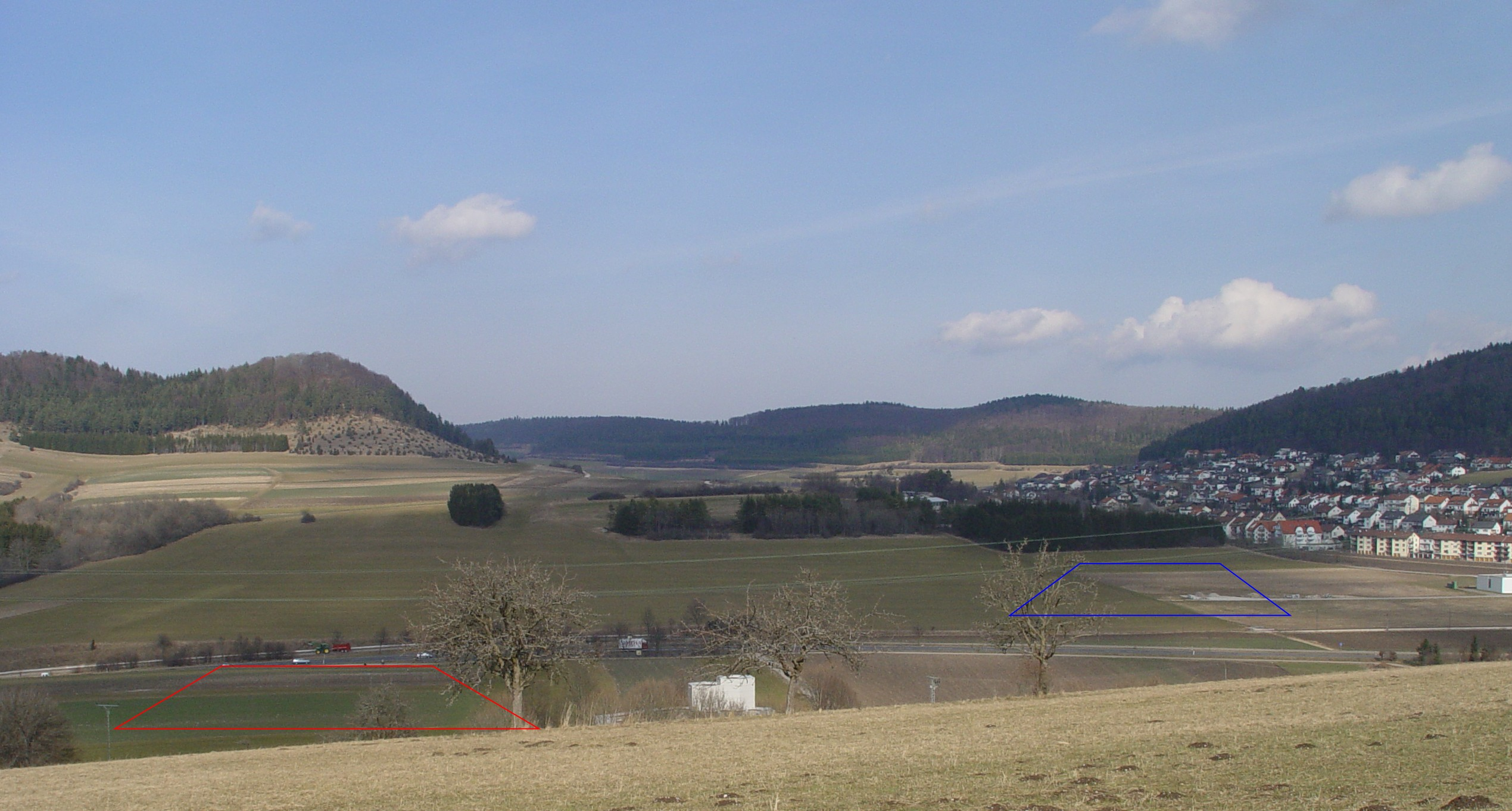 Lage des römischen Kastells Burladingen, (rote Umrandung).